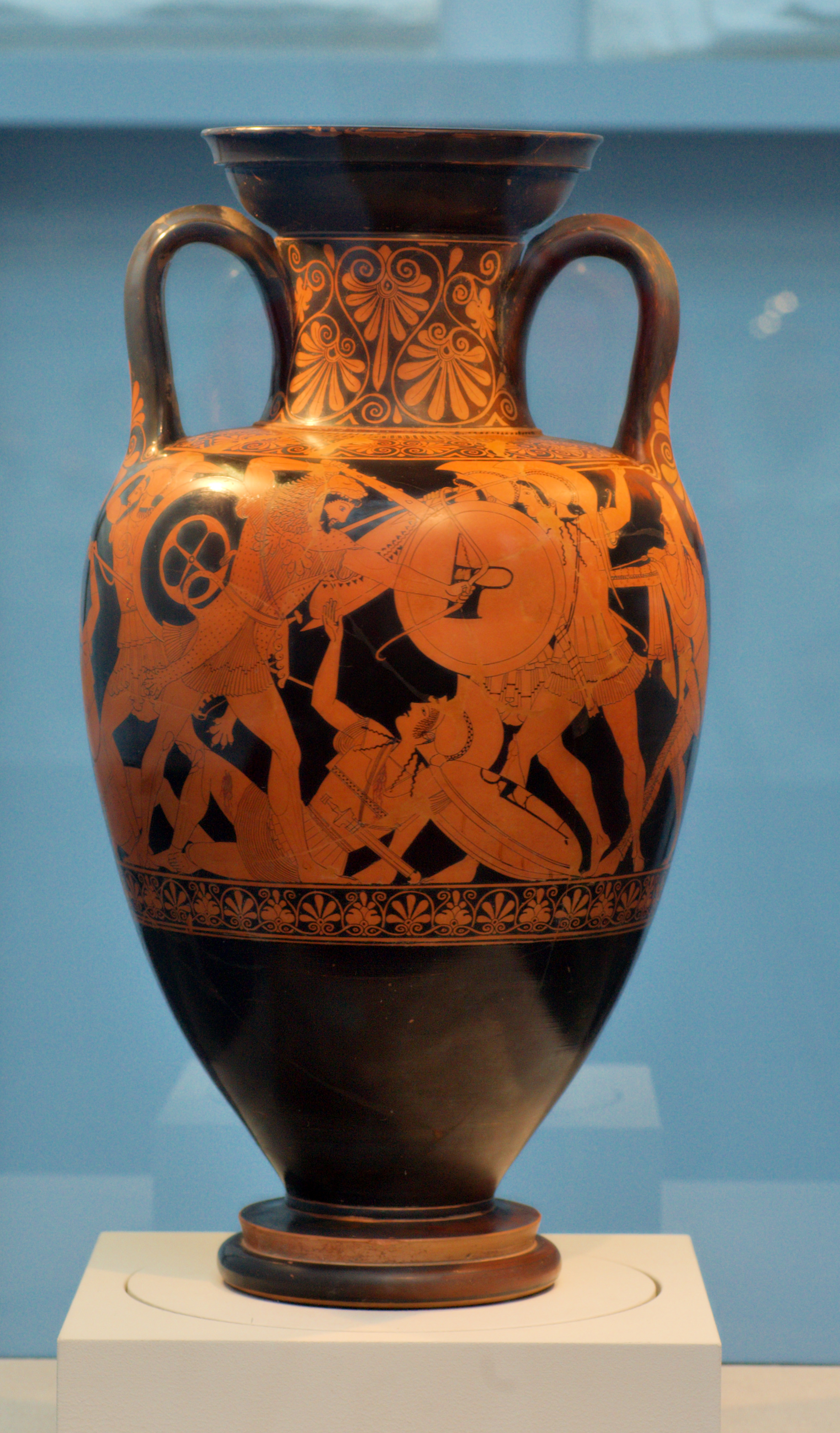 Griechischer Helden im Kampf gegen acht bzw. zwei Amazonen. "Berliner Maler" um 490 v.Chr.